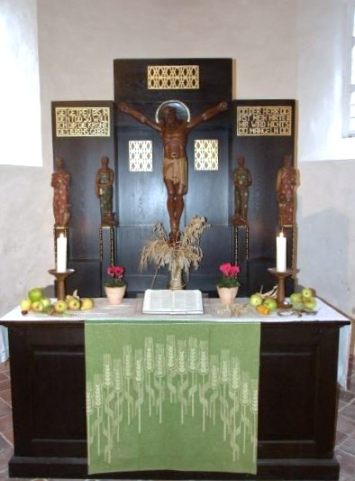 Altar der St.-Elisabeth-Kirche Wangerland-Westrum